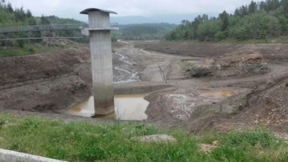 Lors de sa vidange, après l'accident de 2017.